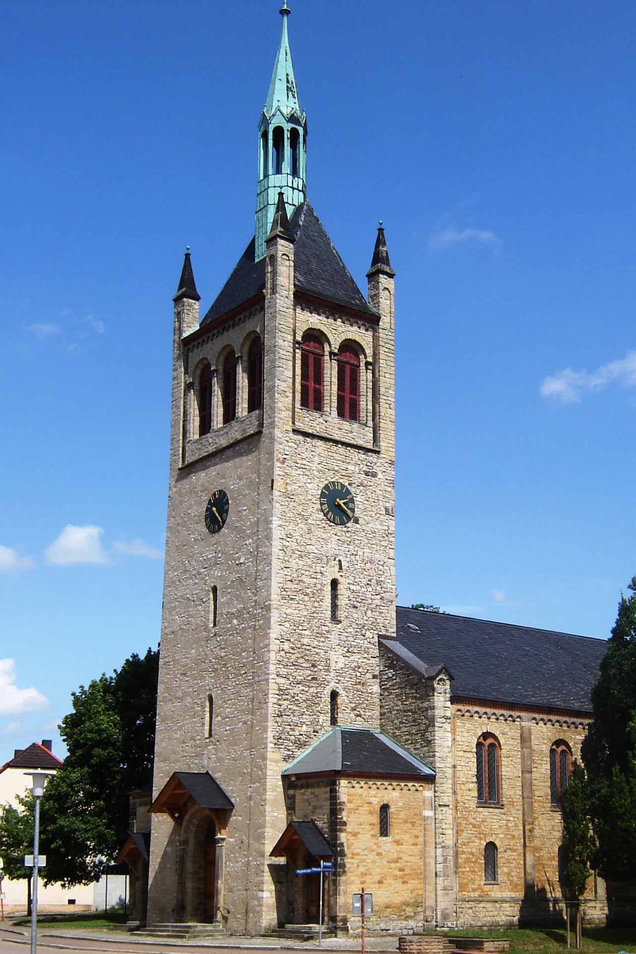 St.-Andreas-Kirche in Biere, Sachsen-Anhalt, Deutschland (Südwestansicht)